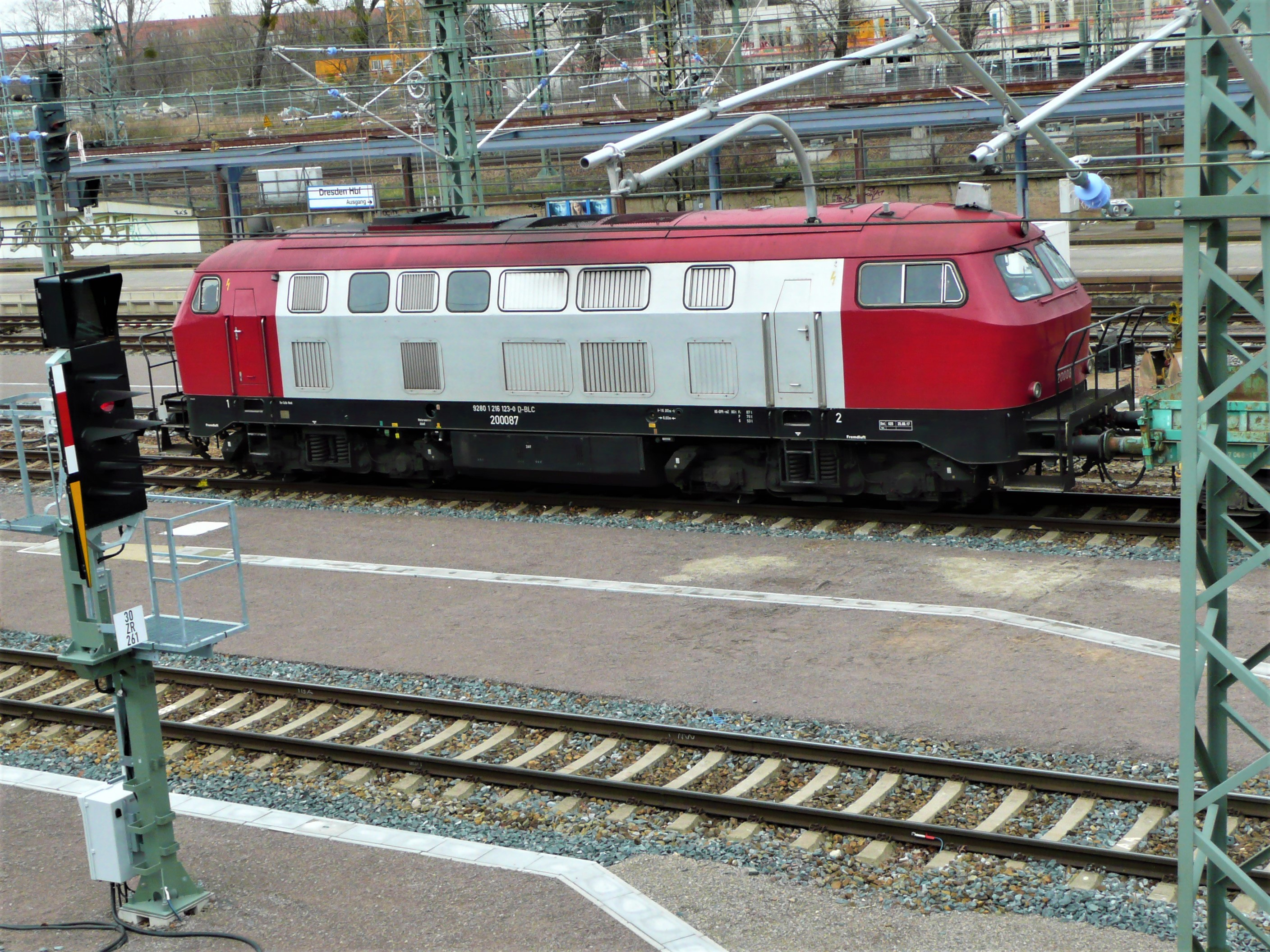 216 123 von BLC zum Bauzugeinsatz in Dresden Hauptbahanhof